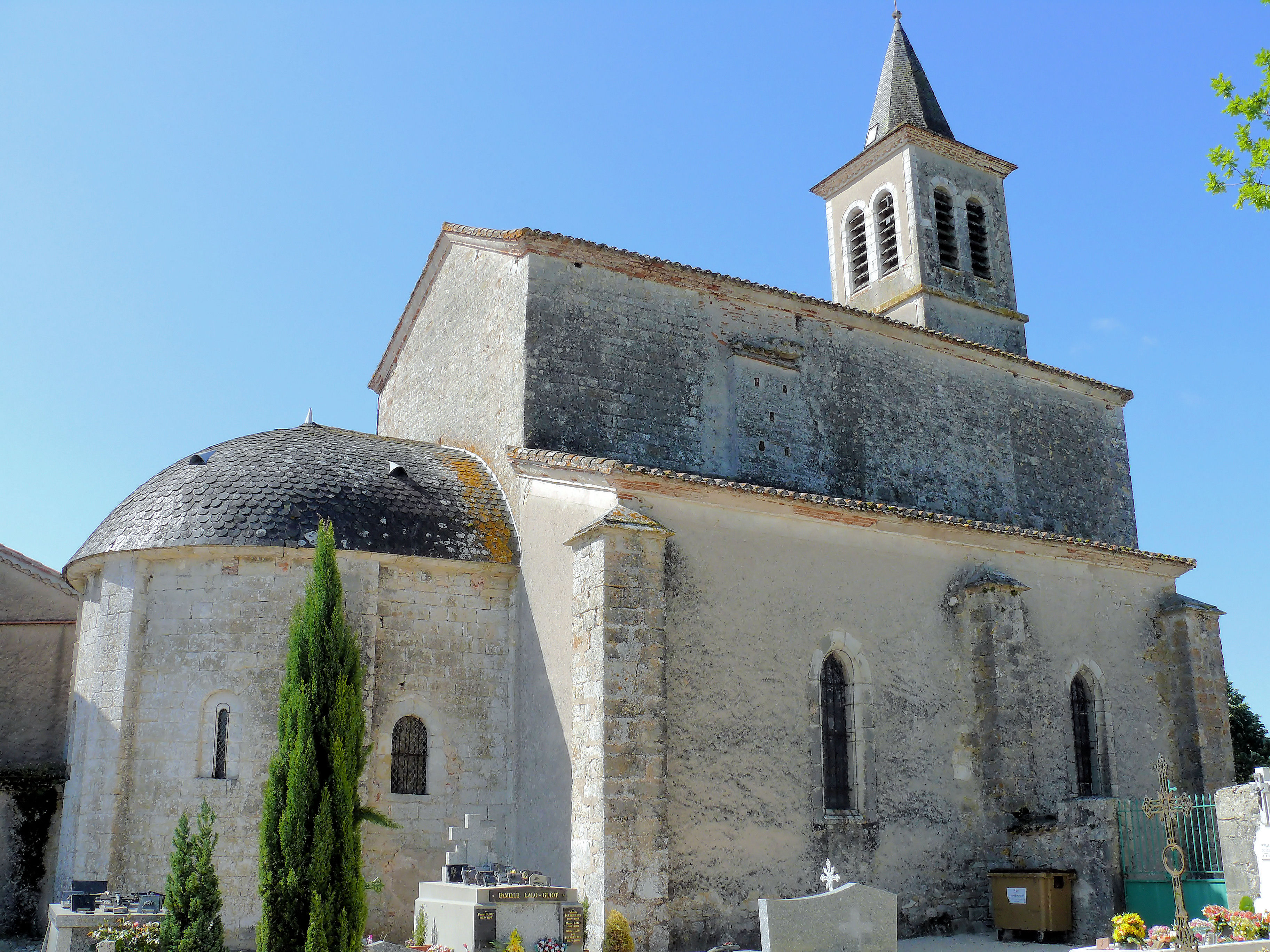 Le Montat - Eglise Saint-Barthélemy - Ensemble vu du cimetière